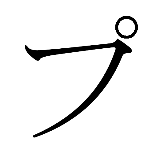 Japanese Katakana "Pu"